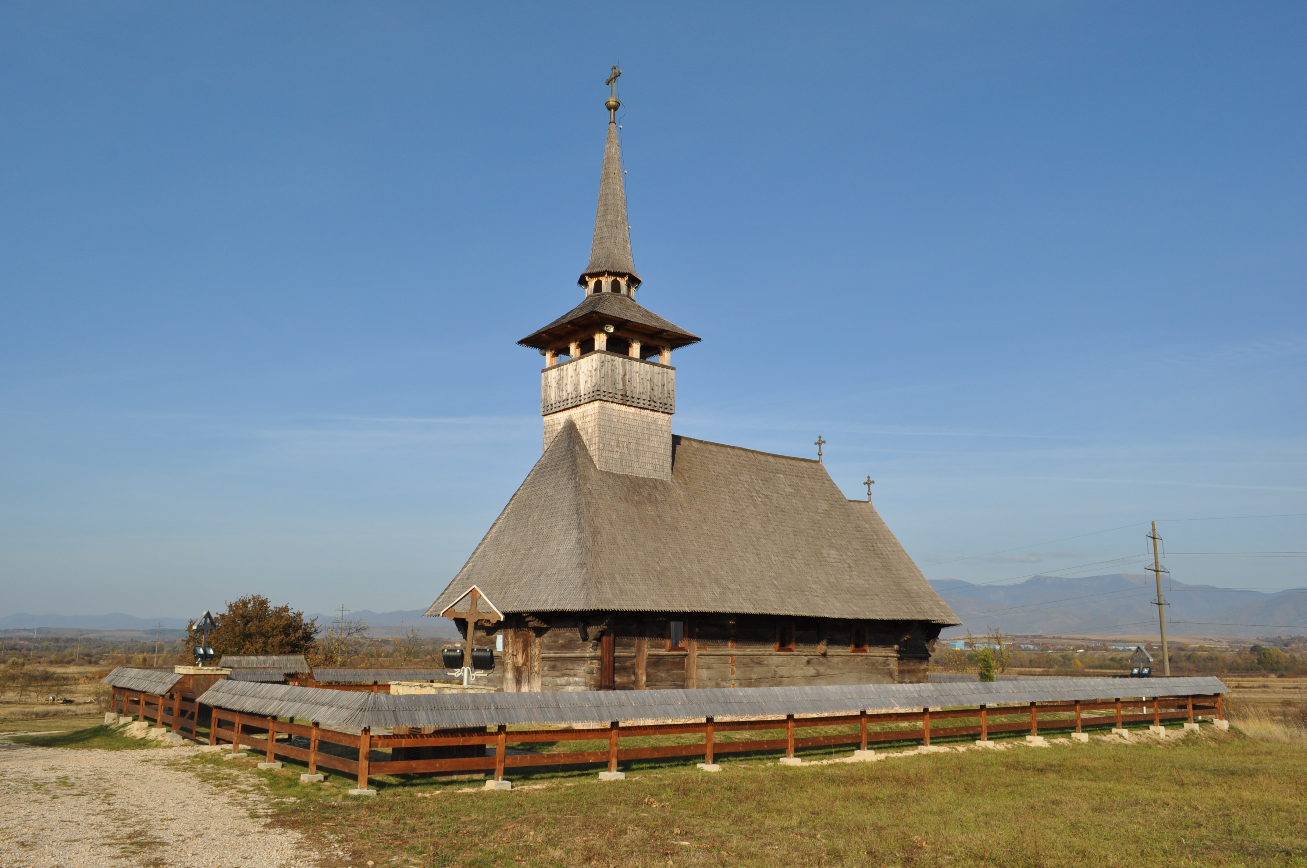 Biserica de lemn „Sf. Trei Ierarhi" din Ghighișeni mutată la Cucuceni